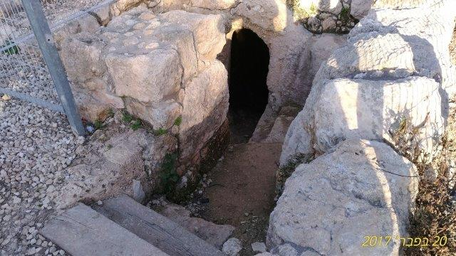 מקווה טהרה אום אל עומדאן, מודיעין